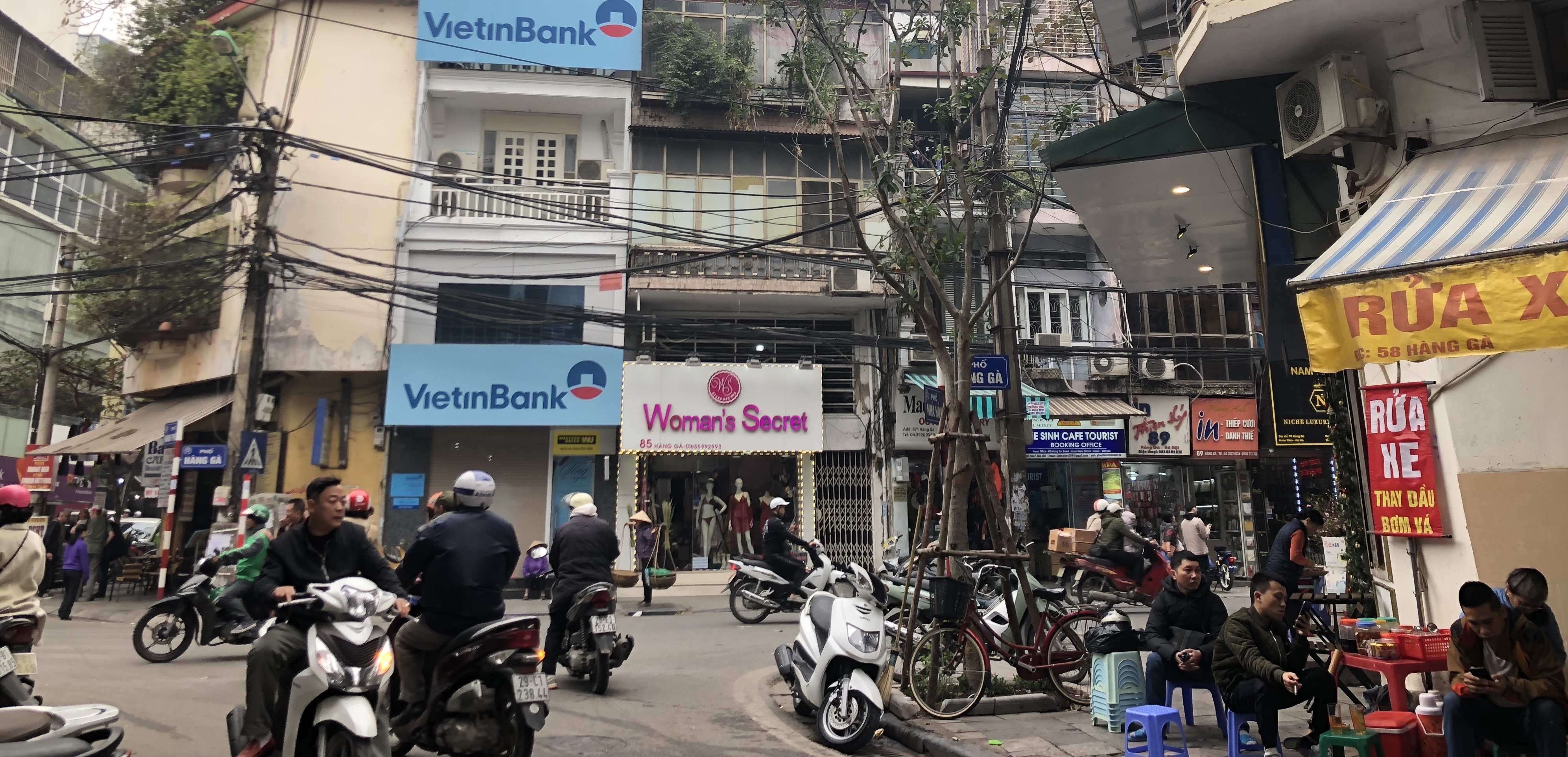 Góc phố Hàng Gà - Nhà Hỏa - Hàng Phèn. Phía sau lưng người chụp là phố Cửa Đông